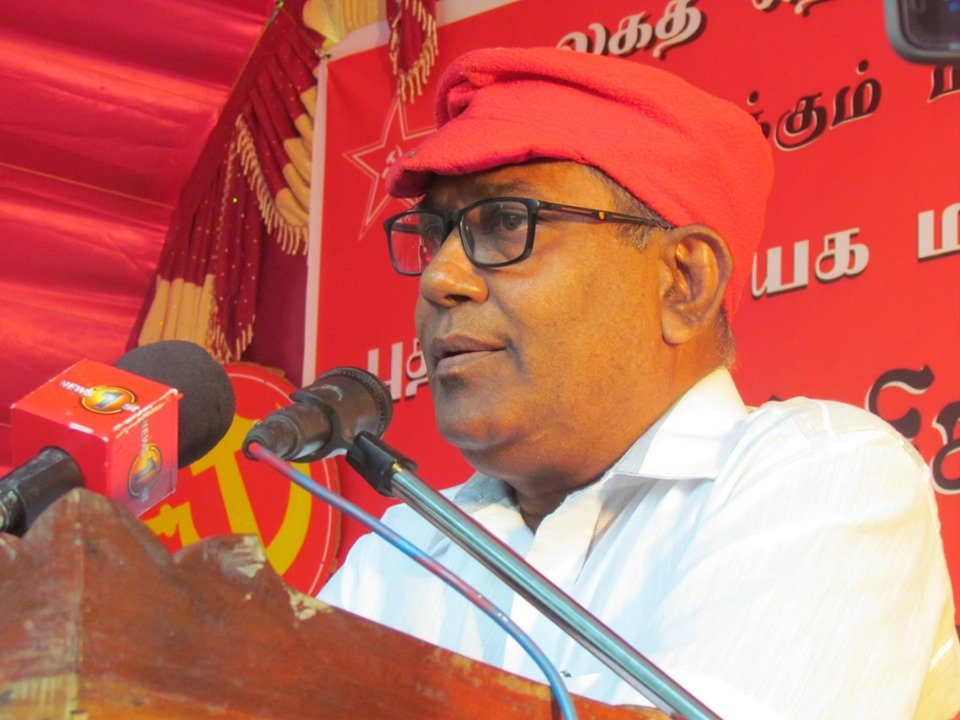 சட்டத்தரணி சோ. தேவராஜா